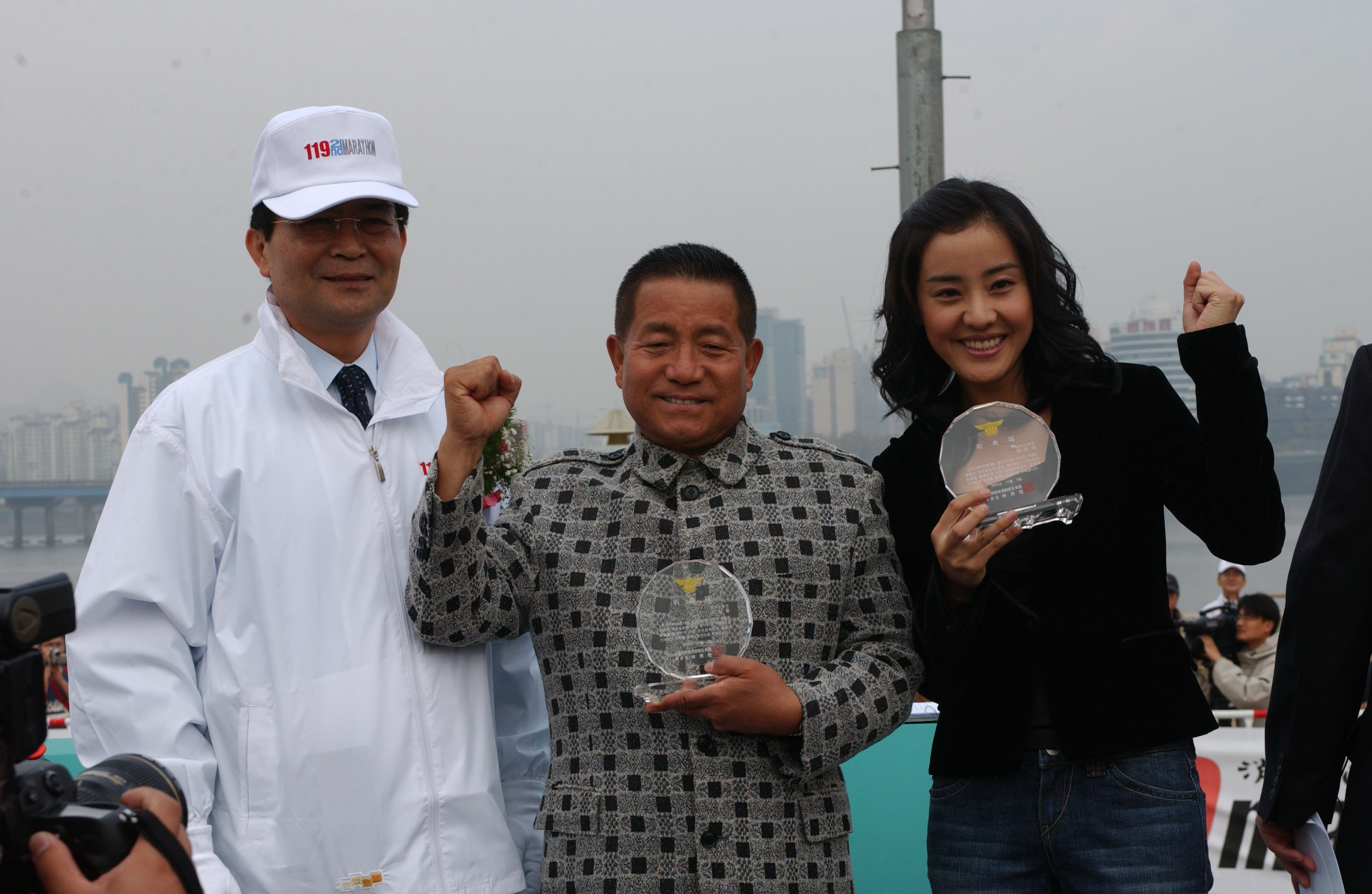 2004년 제2회 전국119마라톤에서 서울소방재난본부장 임용배와 연예인 이상용, 박은혜가 포즈를 취하고 있다.